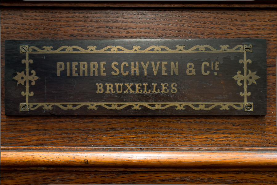 Marque de fabrique "Pierre Schyven & Cie", vers 1896. Celle-ci est fixée au dos de la console de l'orgue de St Calixte, Lambersart, France. Cliché 2012.